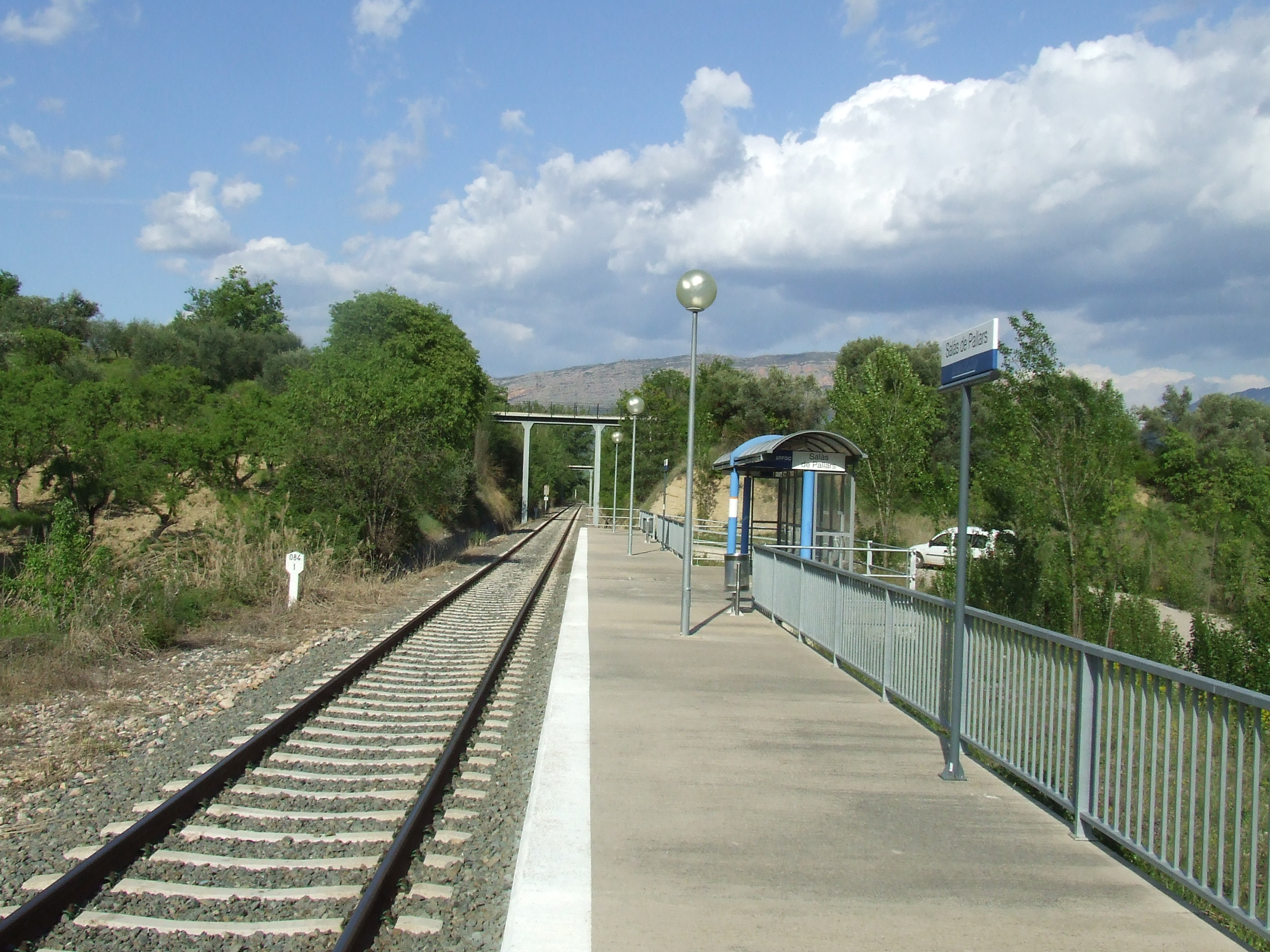 Estació de ferrocarril actual de Salàs de Pallars (Pallars Jussà)